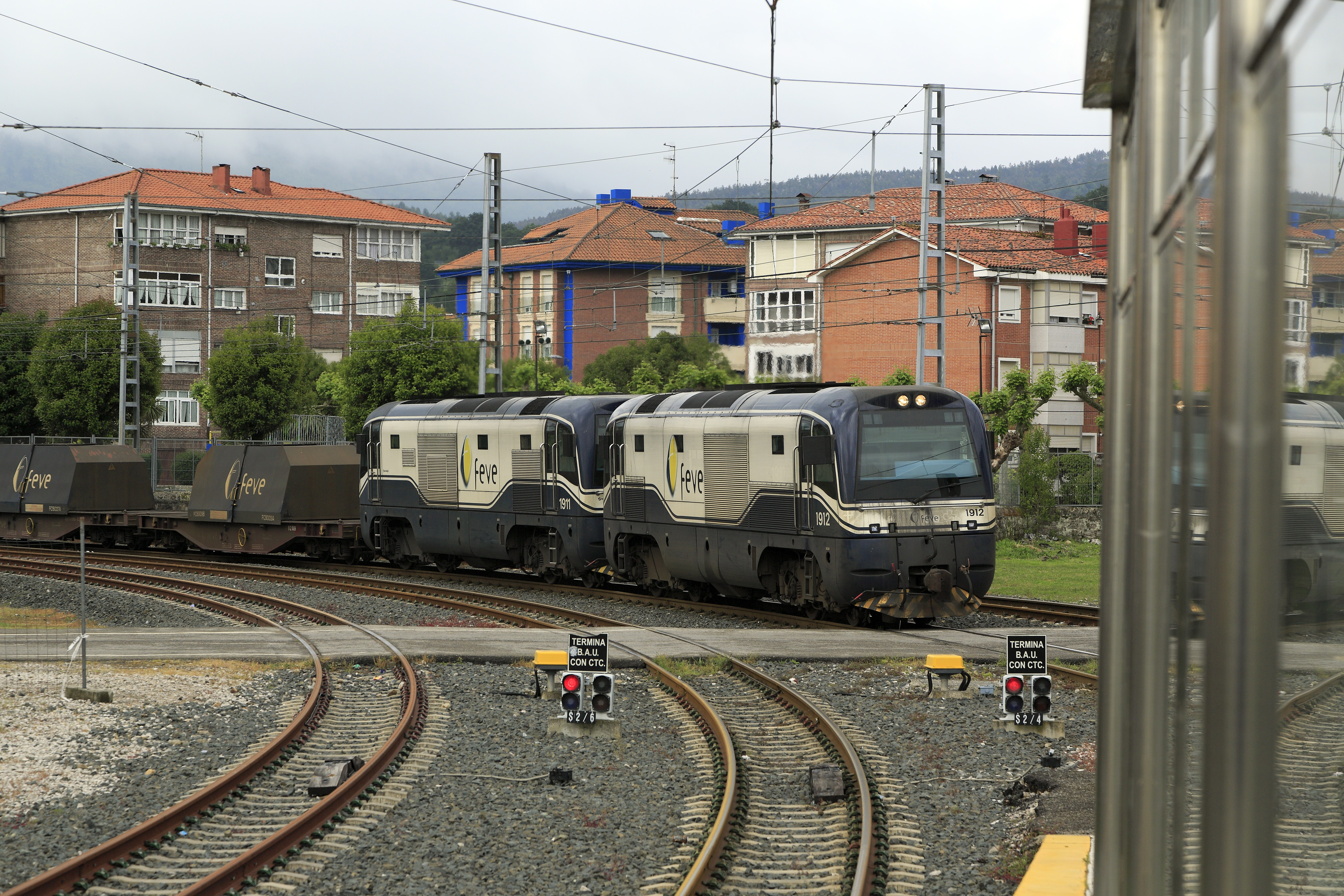 Güterzug mit warmen Metallurgiehalbzeugen Richtung Santander. Die Zweikraftlokomotiven laufen noch im Dieselbetrieb, hier in Cabezón de la Sal beginnt die Fahrleitung.